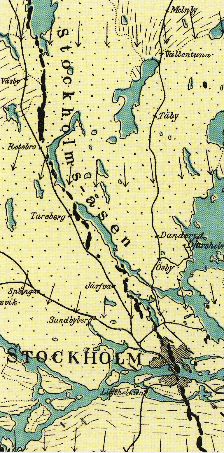 Stockholmsåsen, rullstensåsen från Arlanda till Södertörn